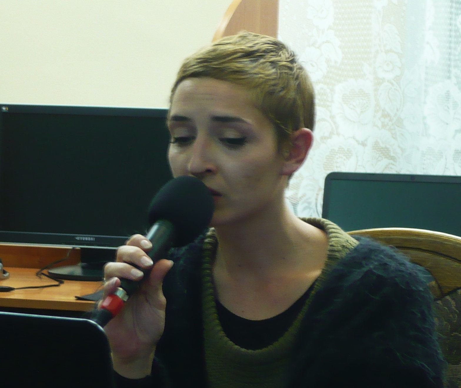 Ilona Witkowska na Festiwalu Literacko-Artystycznym PRETEXTY. 3.10.2015 r. w Miejskiej Bibliotece Publicznej w Nowej Rudzie